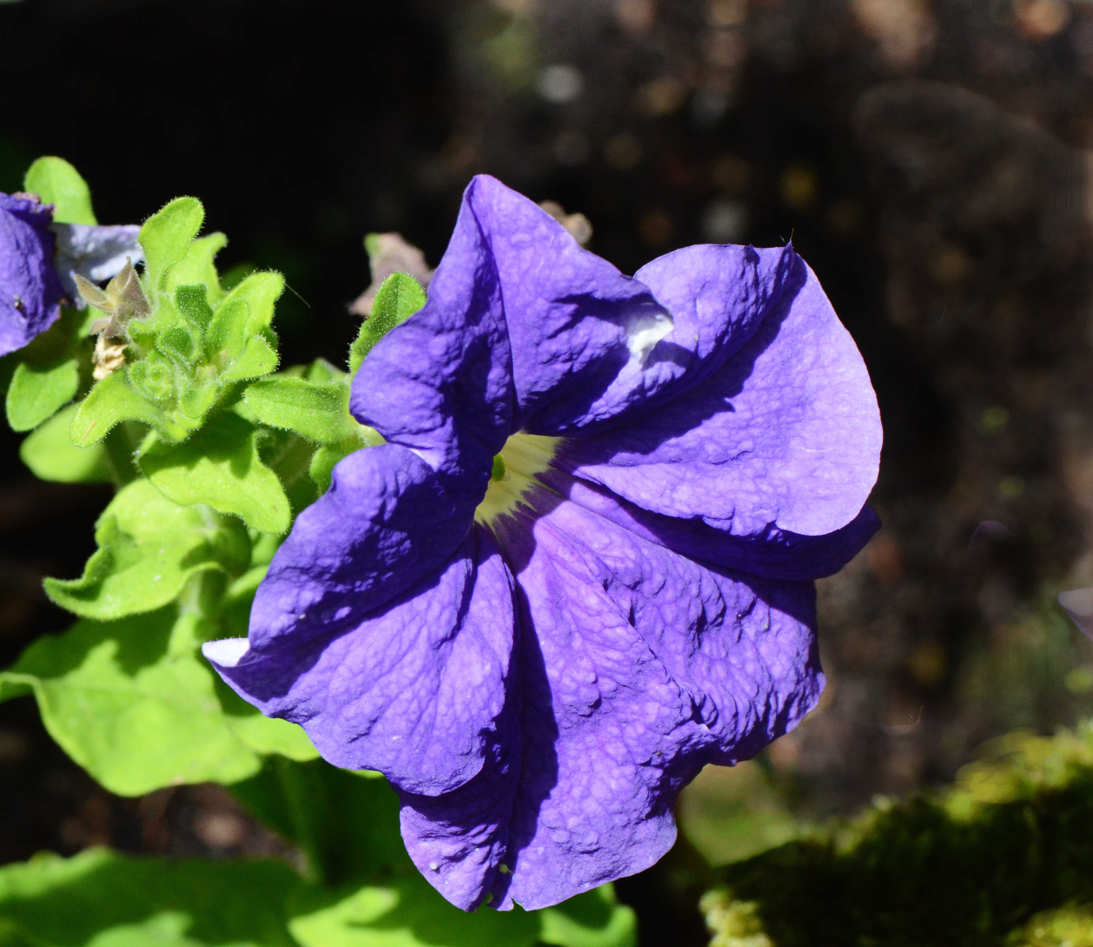 Petunia 'Parade Sky Blue', Jardin des Plantes de Paris